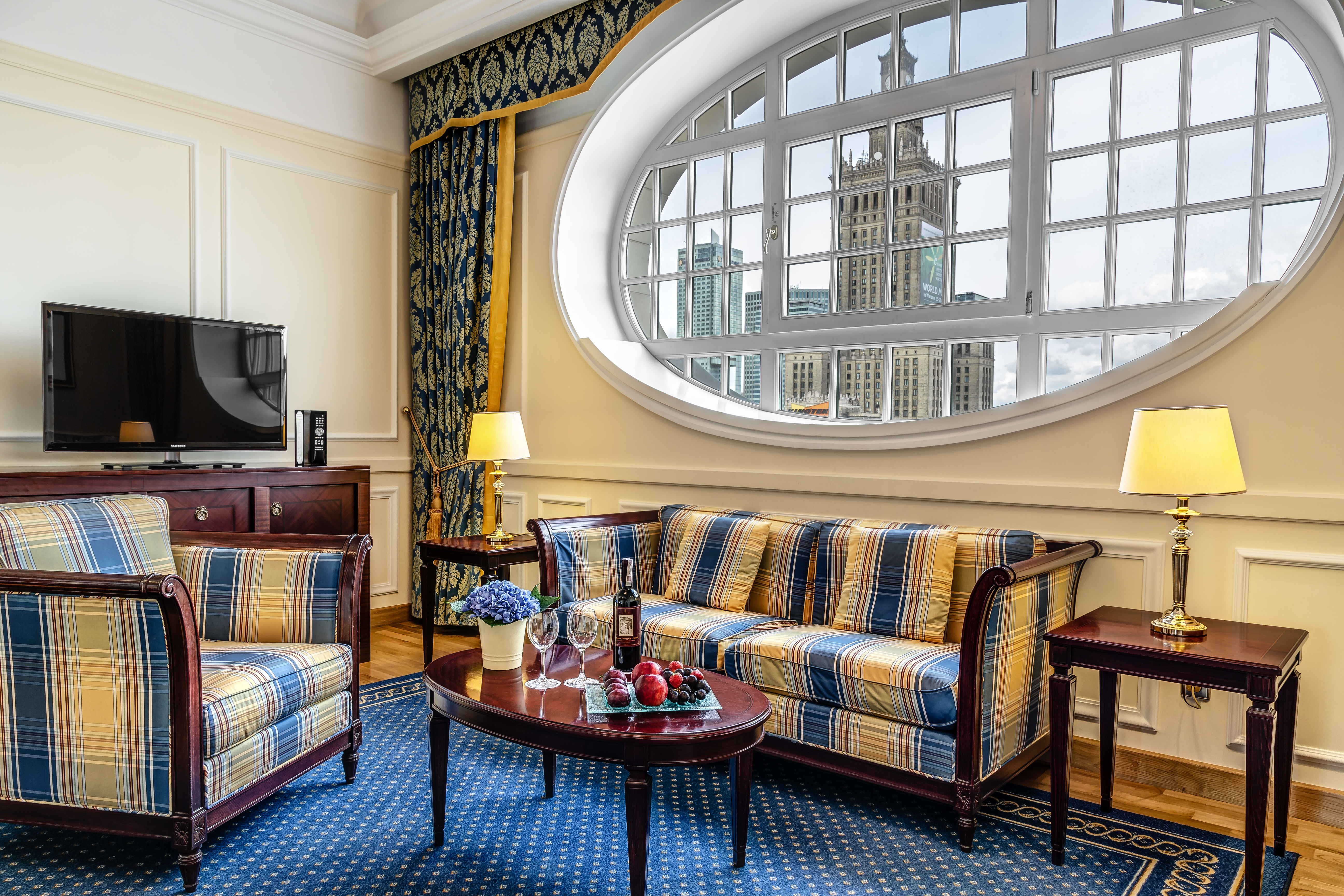 Apartament Angielski. Hotel Polonia Palace w Warszawie